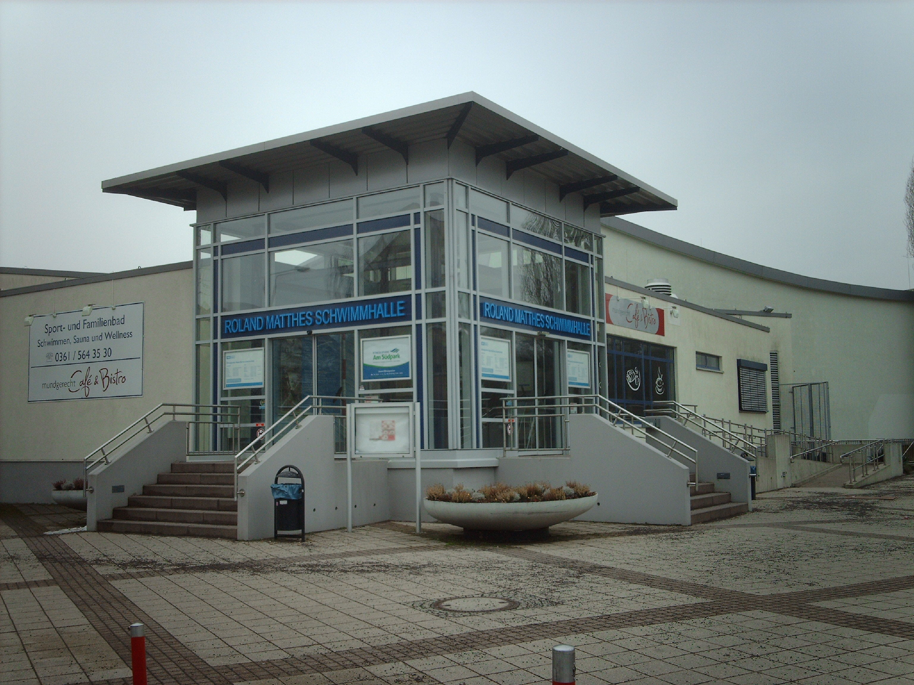 Roland-Matthes-Schwimmhalle in Erfurt